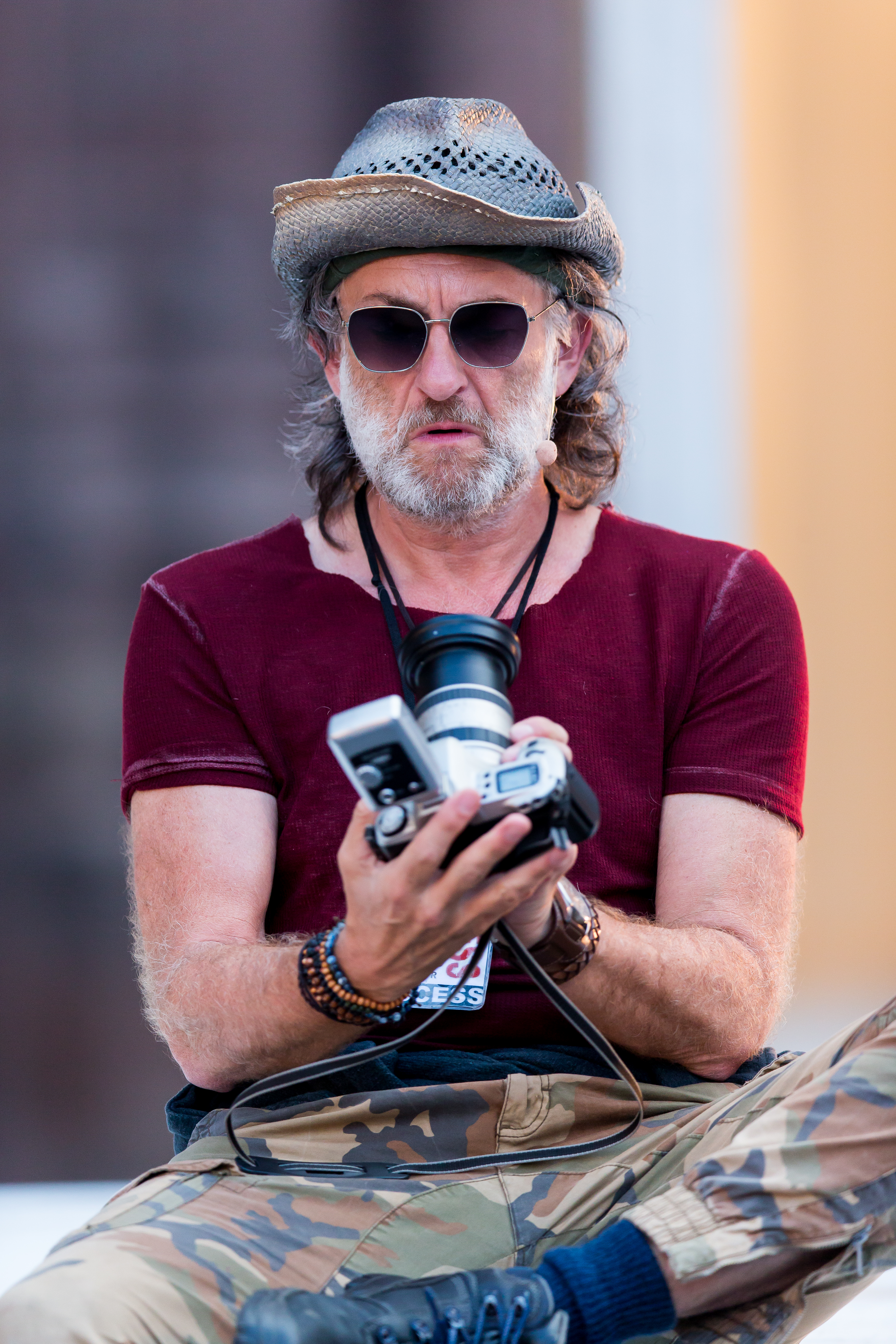 2016: Uraufführung: "GOLD. Der Film der Nibelungen" Regie: Nuran David Calis Autor: Albert Ostermaier Intendant: Nico Hofmann --- Ensemble: Produzent Konstantin Trauer: Uwe Ochsenknecht Regisseur Arsenij Kubik: Vladimir Burlakov Drehbuchautor Charlie P. Weide: Josef Ostendorf Society Reporter Peter Scheumer: Dominic Raacke Kamerafrau "the eye": Anna Rot Setdesignerin "set": Joy Maria Bai Assistentin des Produzenten Carmen: Alexandra Kamp Maskenbildnerin Sueyla Blume : Ayse Bosse die Ältere Kriemhild Karina Bergmann: Katja Weitzenböck die Jüngere Kriemhild Simone Gehel: Constanze Wächter die Ältere Brünhild Lotte Jünger: Michaela Steiger die Jüngere Brünhild Nathalie Aurun: Dennenesch Zoudé Siegfried Mohamad Söder: Ismail Deniz Hagen René Inner: Sascha Göpel Gunther Klaus Castel: Maximilian Laprell Bürgermeister Franz Koppoler: Heiner Lauterbach during Nibelungenfestspiele "GOLD. Der Film der Nibelungen" at Wormser Kaiserdom, Worms, Rheinland Pfalz, Germany on 2016-07-12, Photo: Sven Mandel